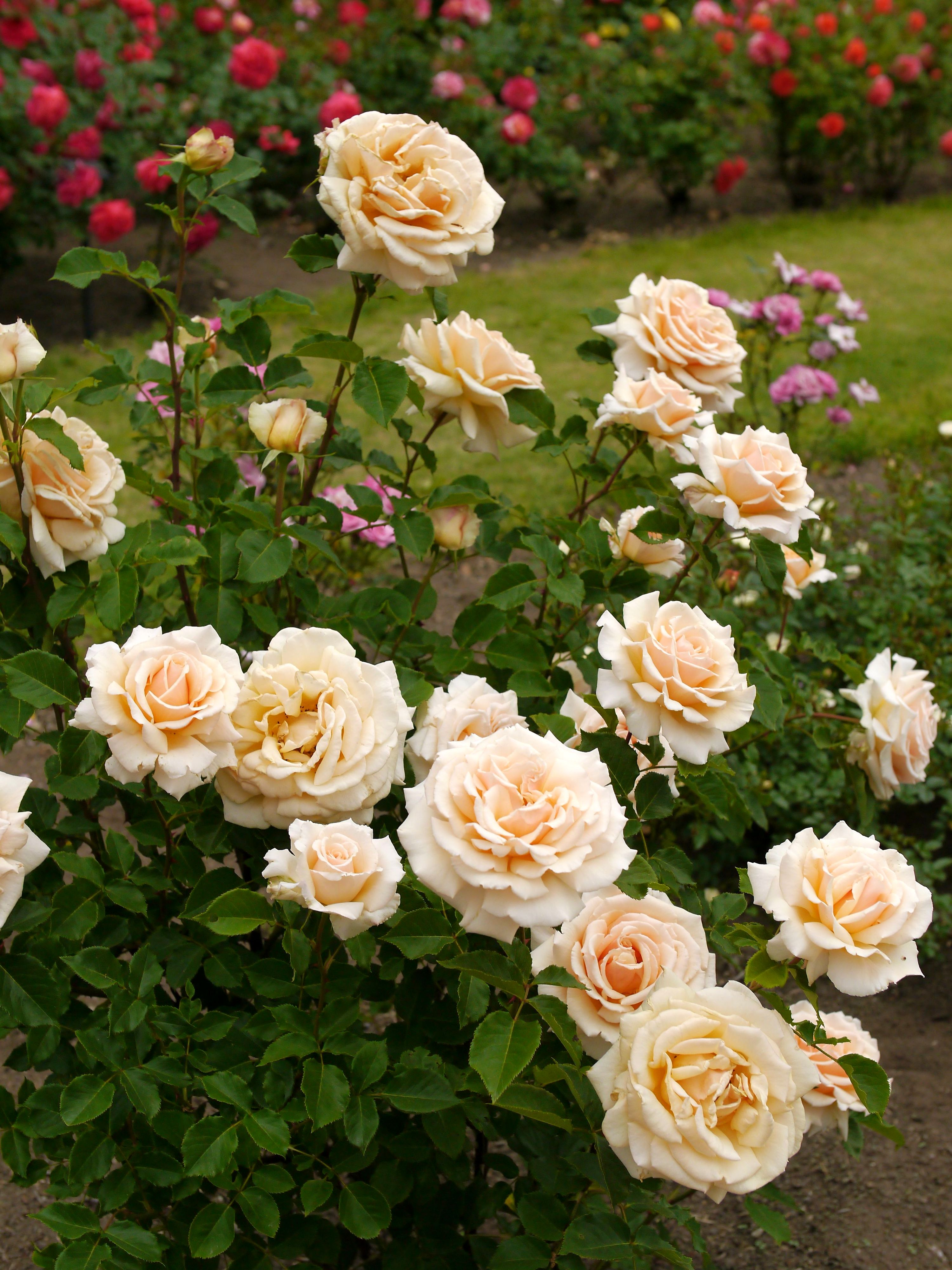 Rose, Diamond Jubilee, バラ, ダイアモンド ジュビリー, Hybrid Tea rose ハイブリッドティーローズ United States of America アメリカ合衆国 Boerner 1947